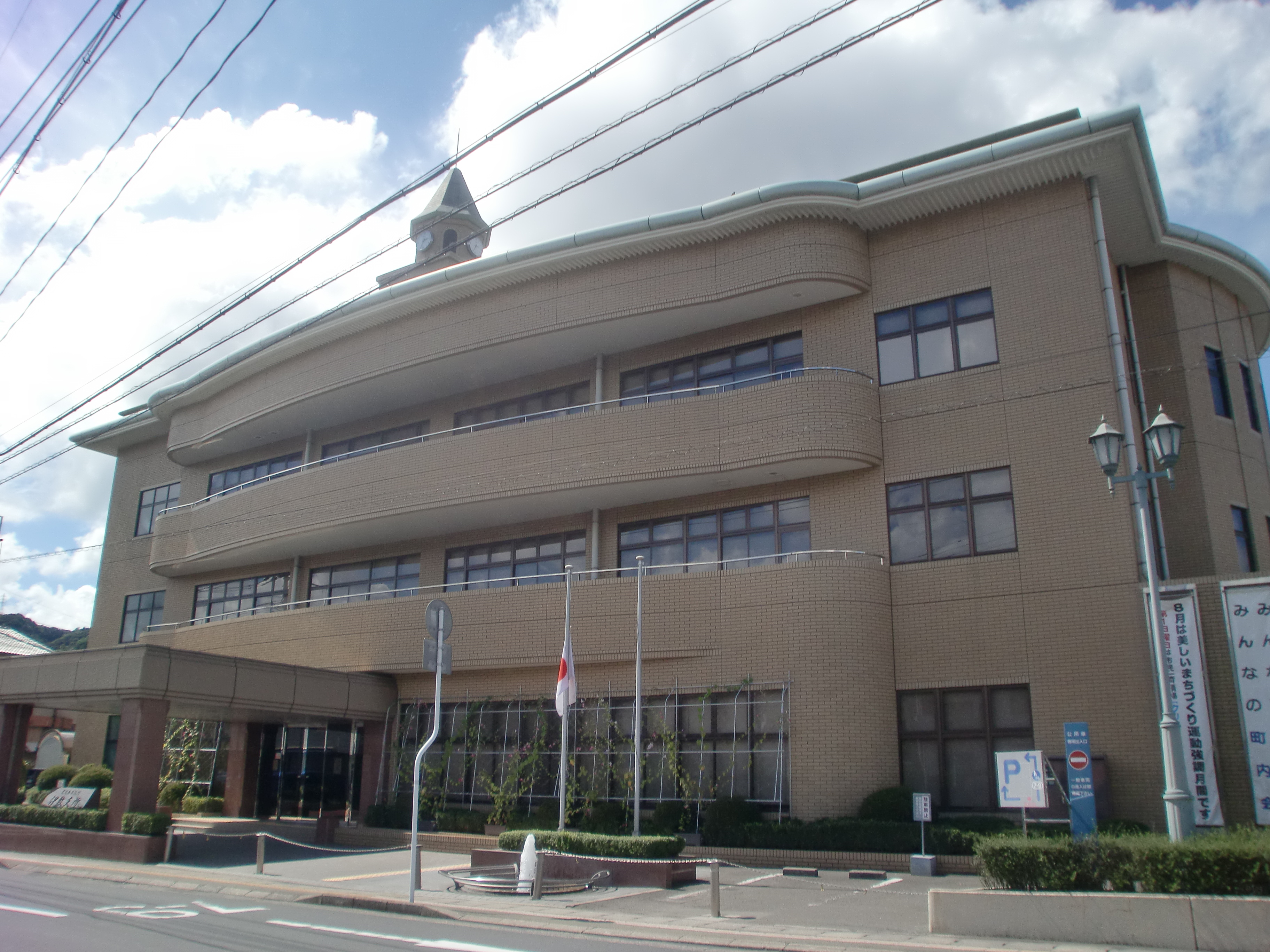 鹿児島市役所#伊敷支所の外観。